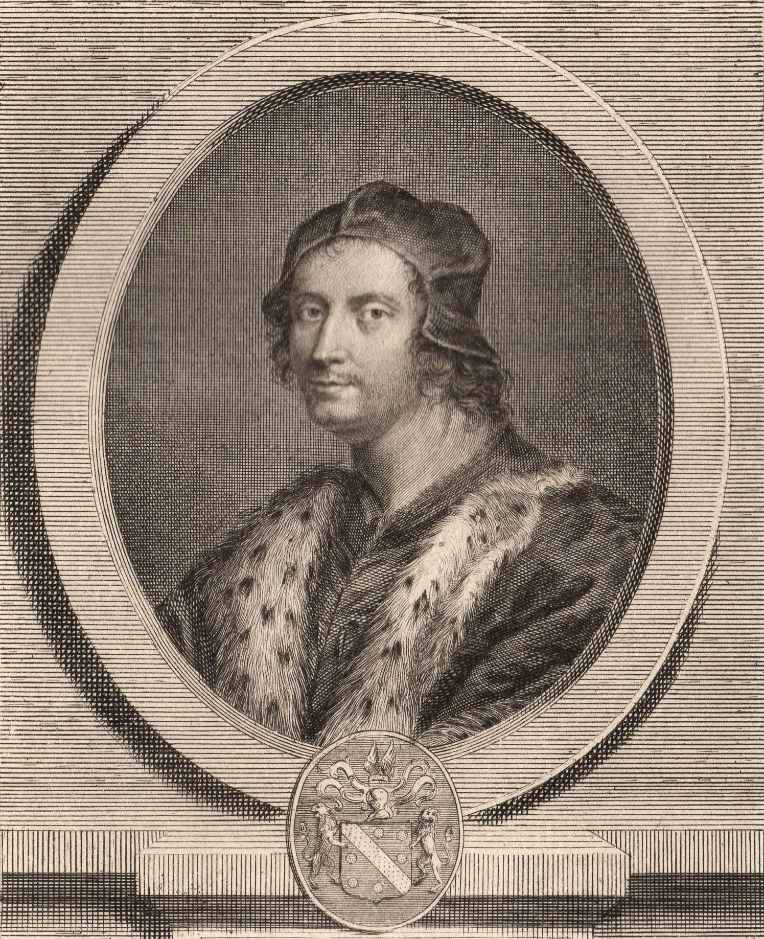 scan d'une gravure représentant le chancelier Jean Carondelet.